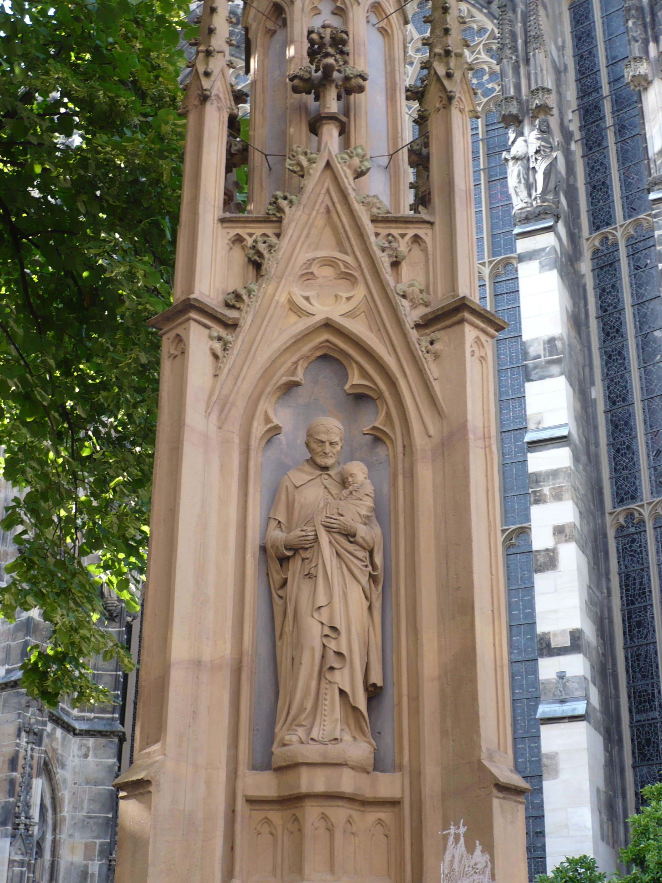 Vinzenzbrunnen auf dem Münsterplatz in Aachen, Figur des Hl. Vinzenz von Paul